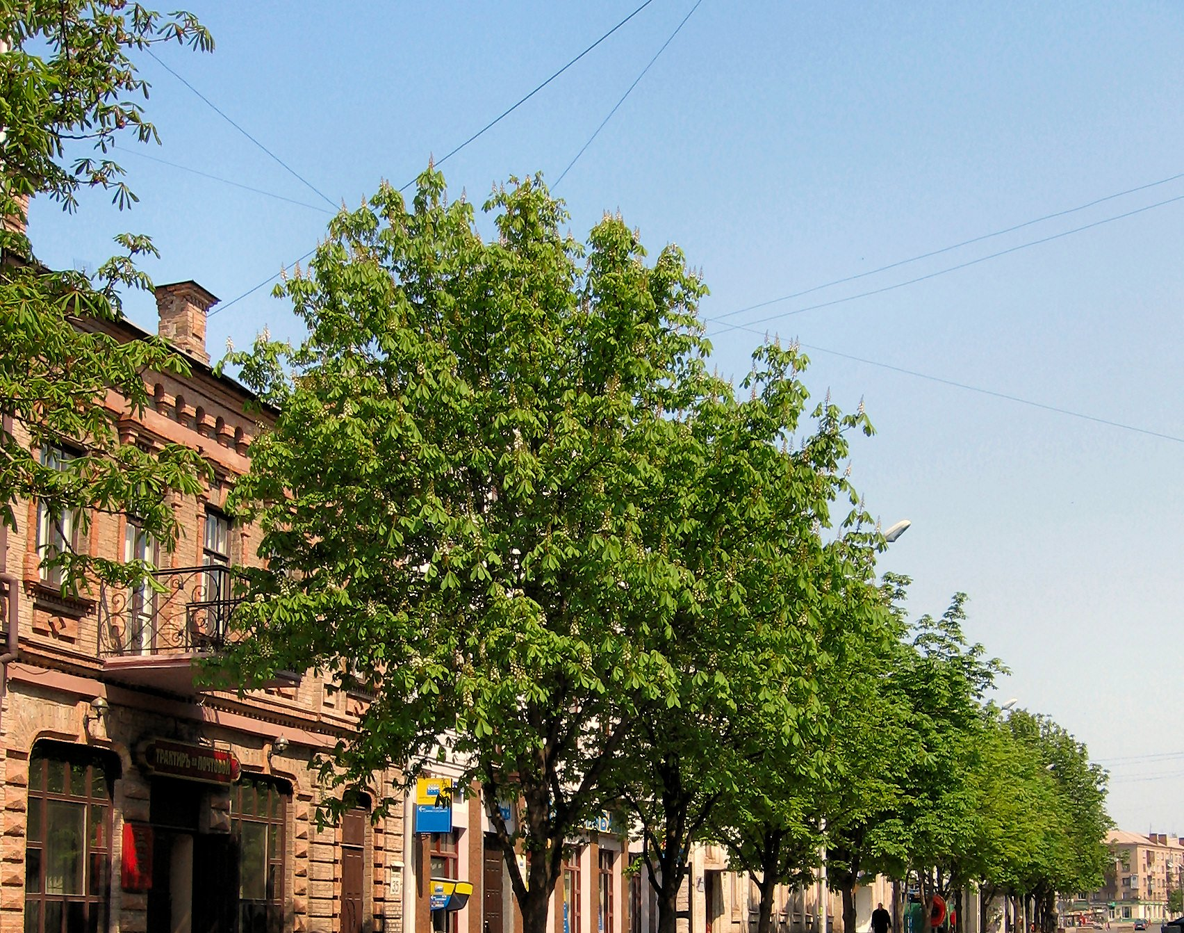 Вулиця Карла Маркса (Кривий Ріг)